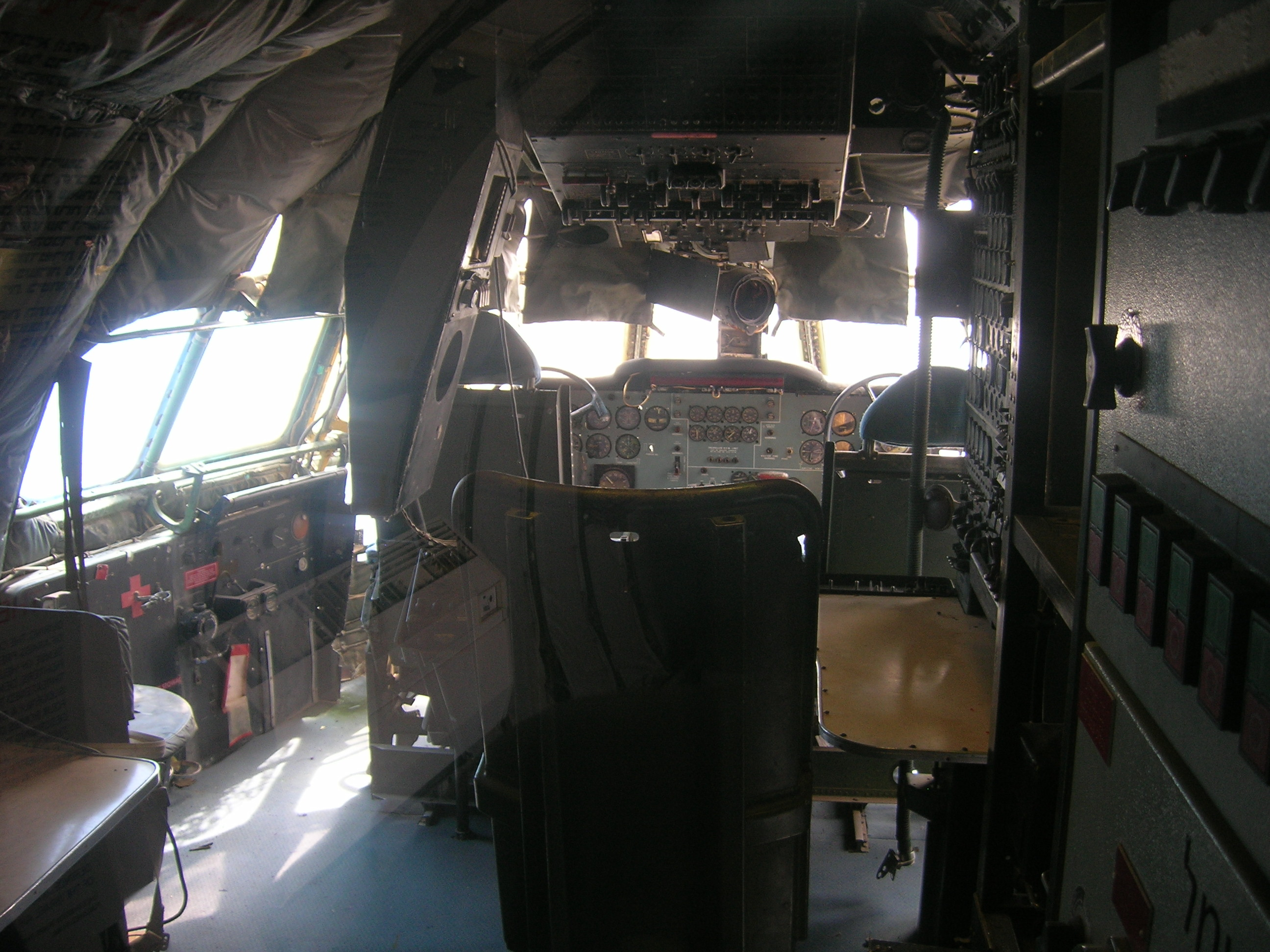 Boeing B-377M Stratocruiser Anak